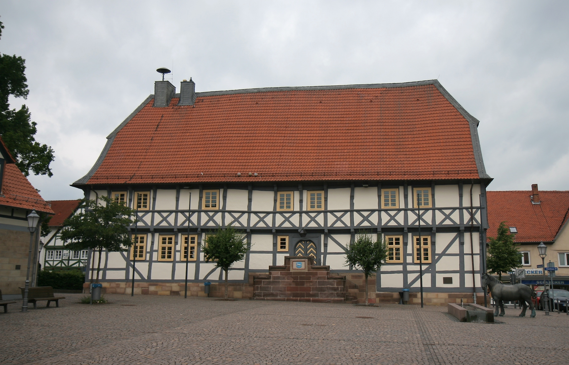 Rathausgebäude in Zierenberg. 1450 errichtet. Ältestes gotisches Fachwerkrathaus in Hessen.